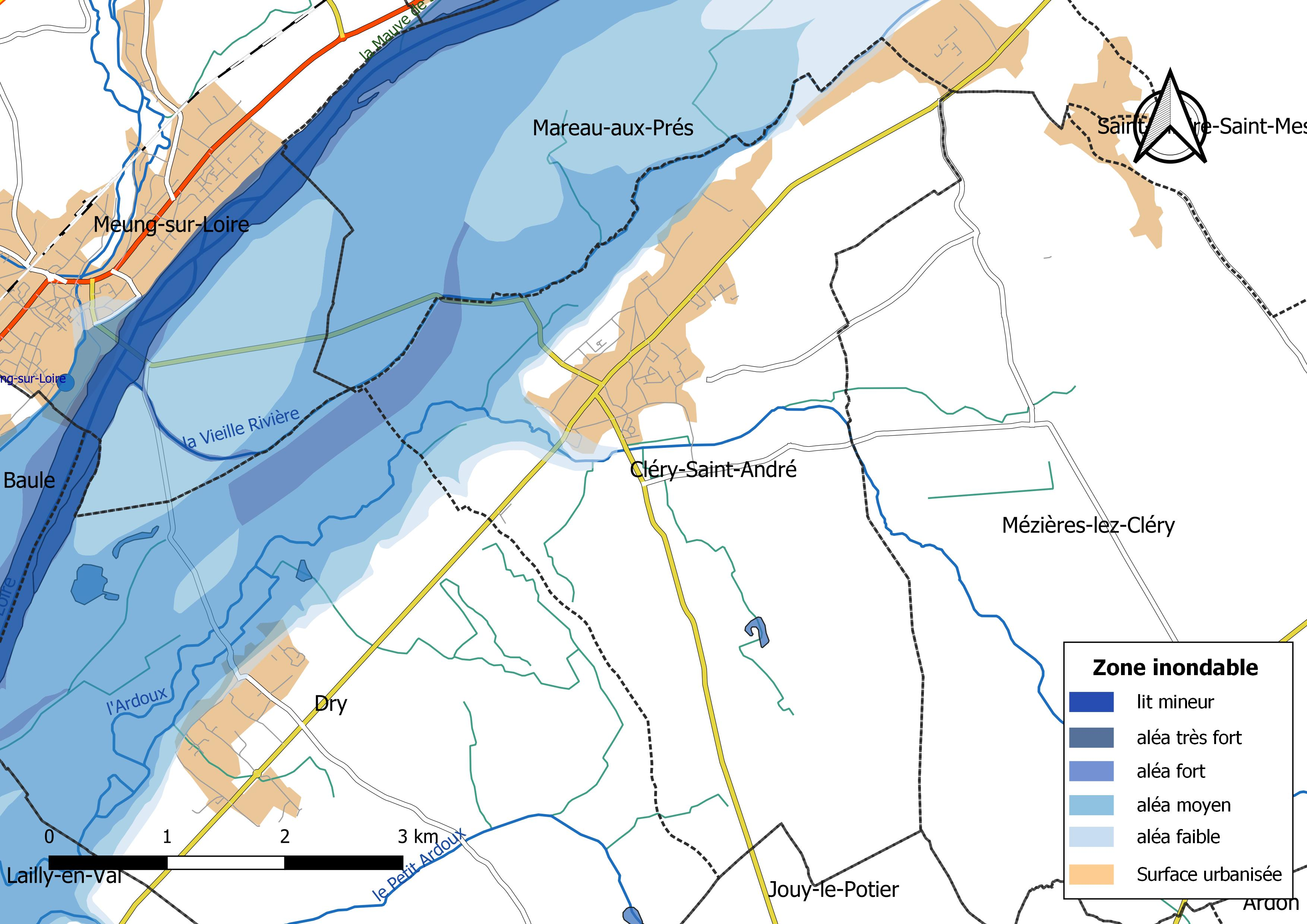 Zone inondable et réseaux hydrographique et routier de la commune de Cléry-Saint-André (Loiret, France).